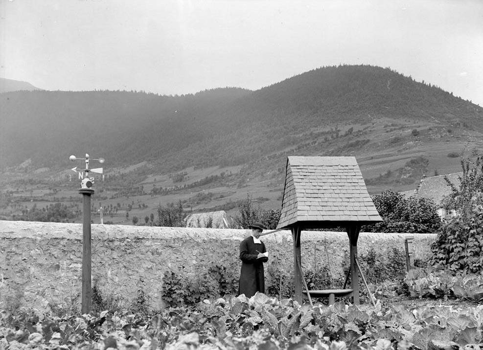 Imatge